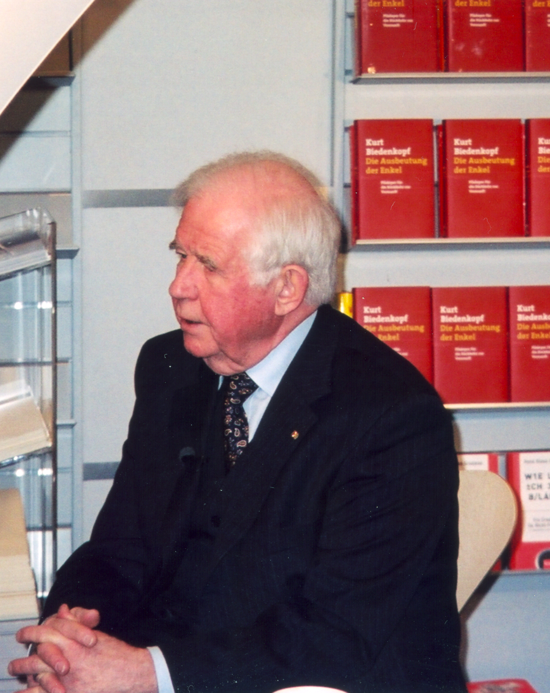 Kurt Biedenkopf, Leipziger Buchmesse 2006